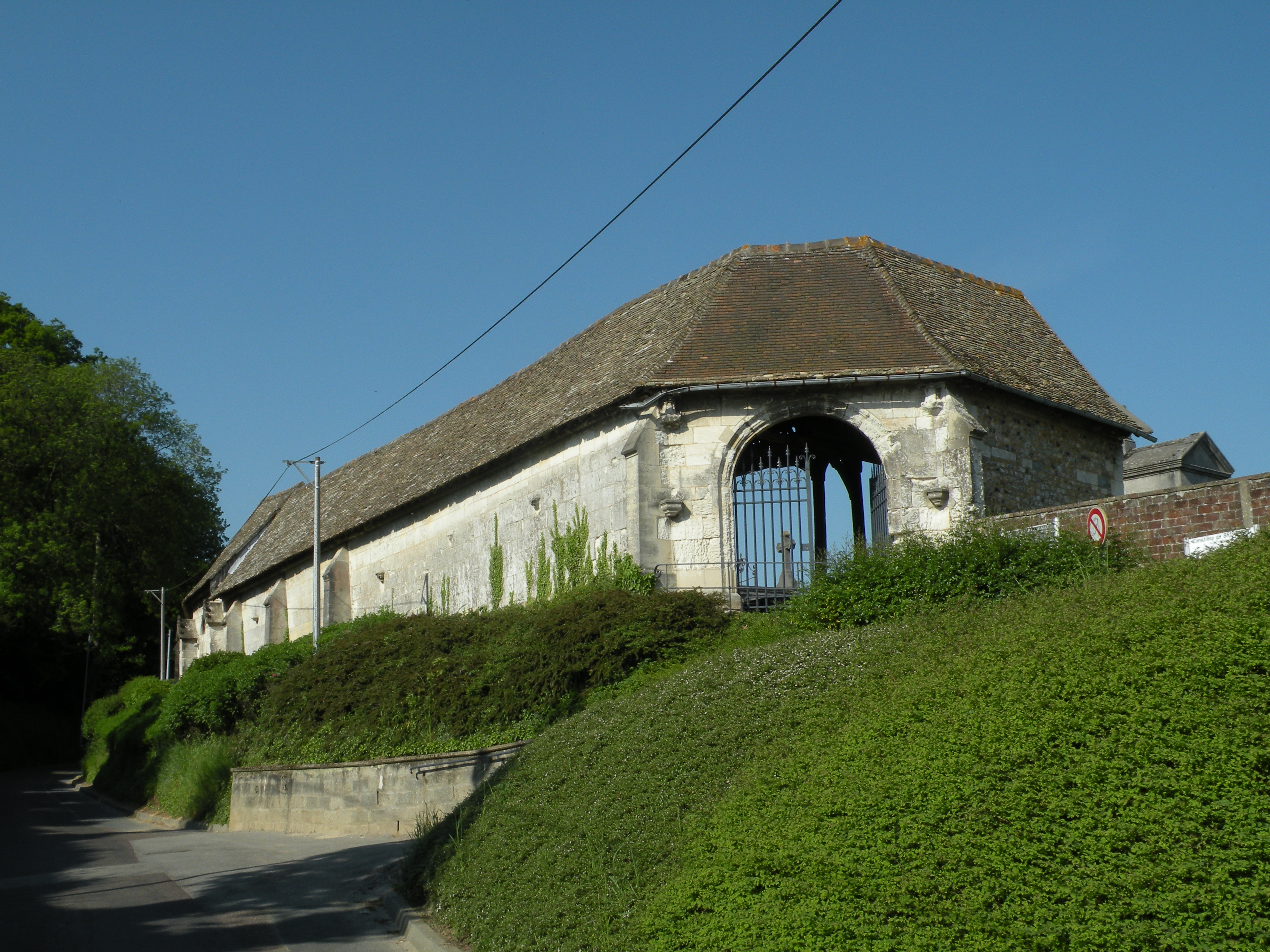 L'aître de Brisgaret à Montivilliers vu depuis la rue Aldric Crevel.